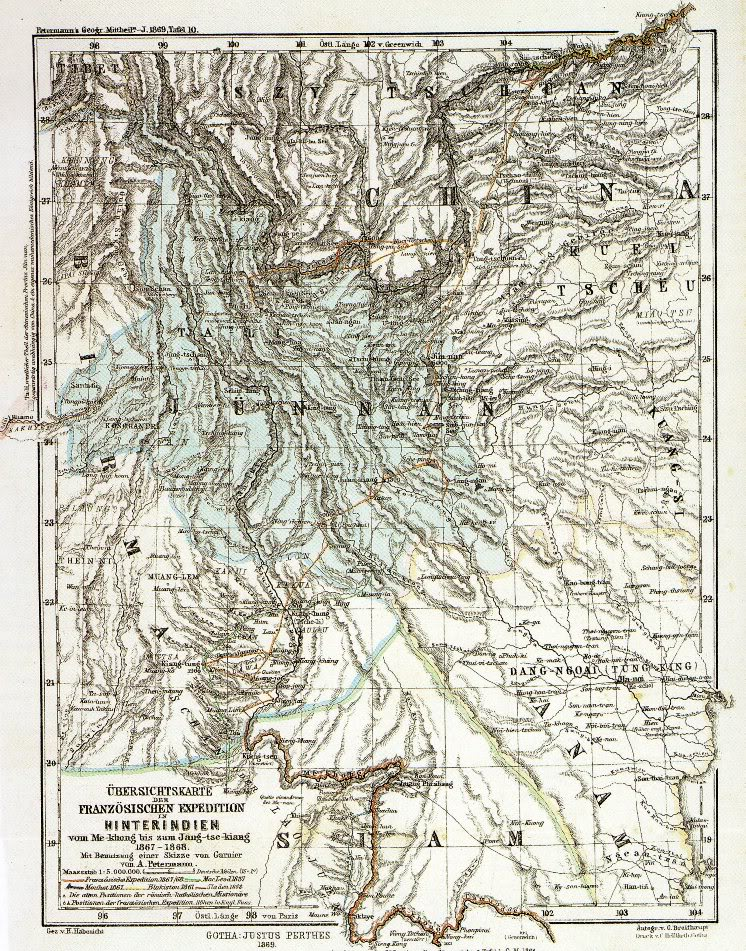 Übersichtskarte der Französischen Expedition in Hinterindien vom Mekong bis zum Jangtsekiang 1867-1868